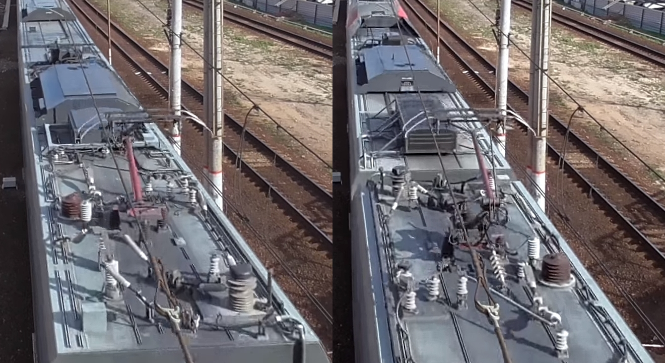 Крышевое токоведущее ооборудование электропоезда ЭС1 - токоприёмники, шины, переключатель родов тока, главные выключатели и т.д.